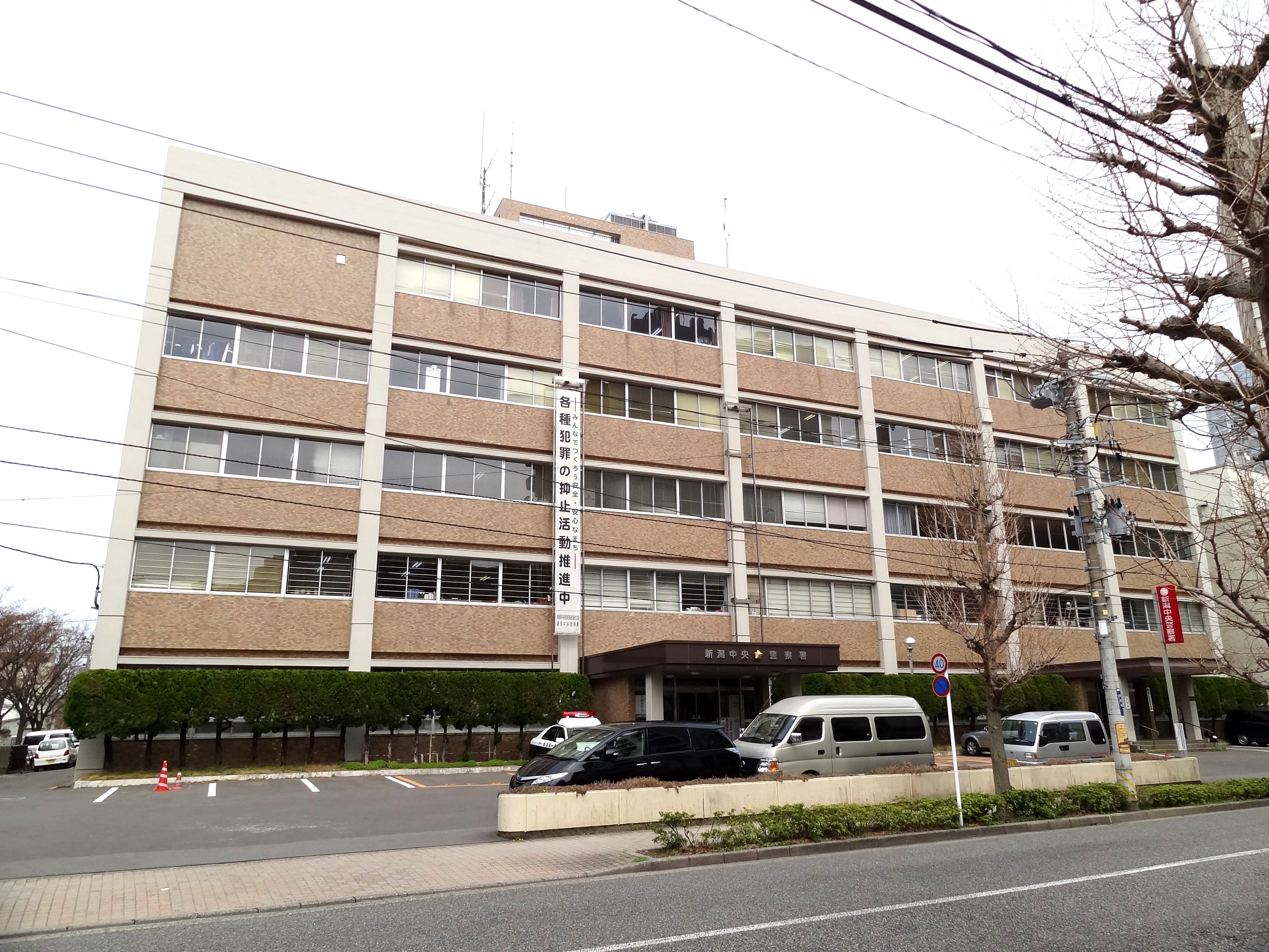 新潟中央警察署